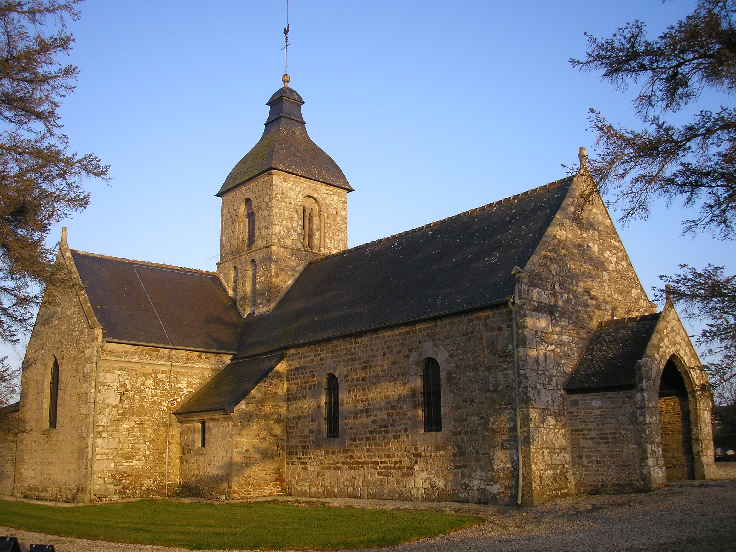 Beaumesnil (Calvados, Normandie, France). L'église Saint-Étienne, inscrite en partie (ISMH, 01/12/1964).